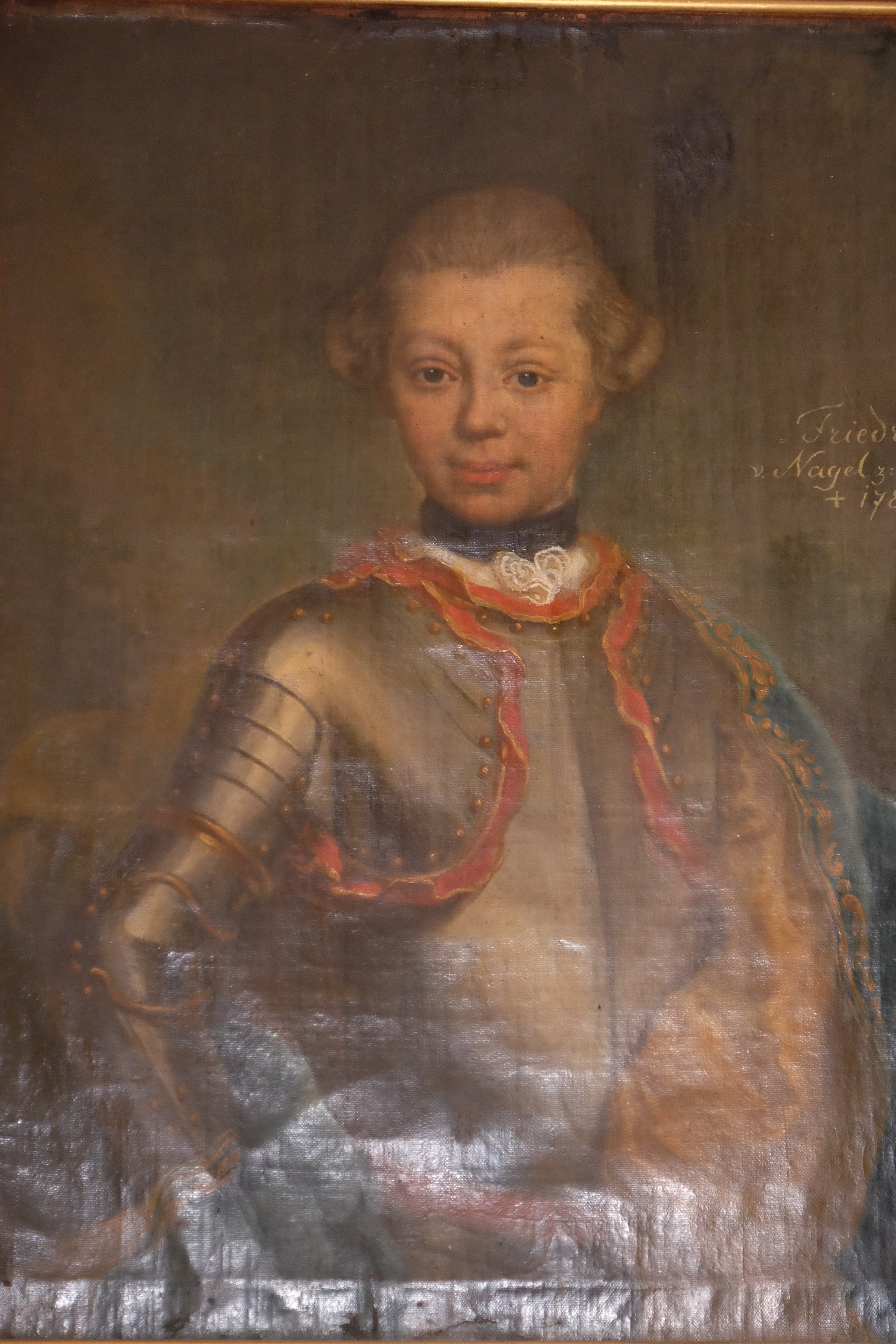 Schloss Tatenhausen mit freundlicher Genemigung von Freiin von Teufel zu Birkensee